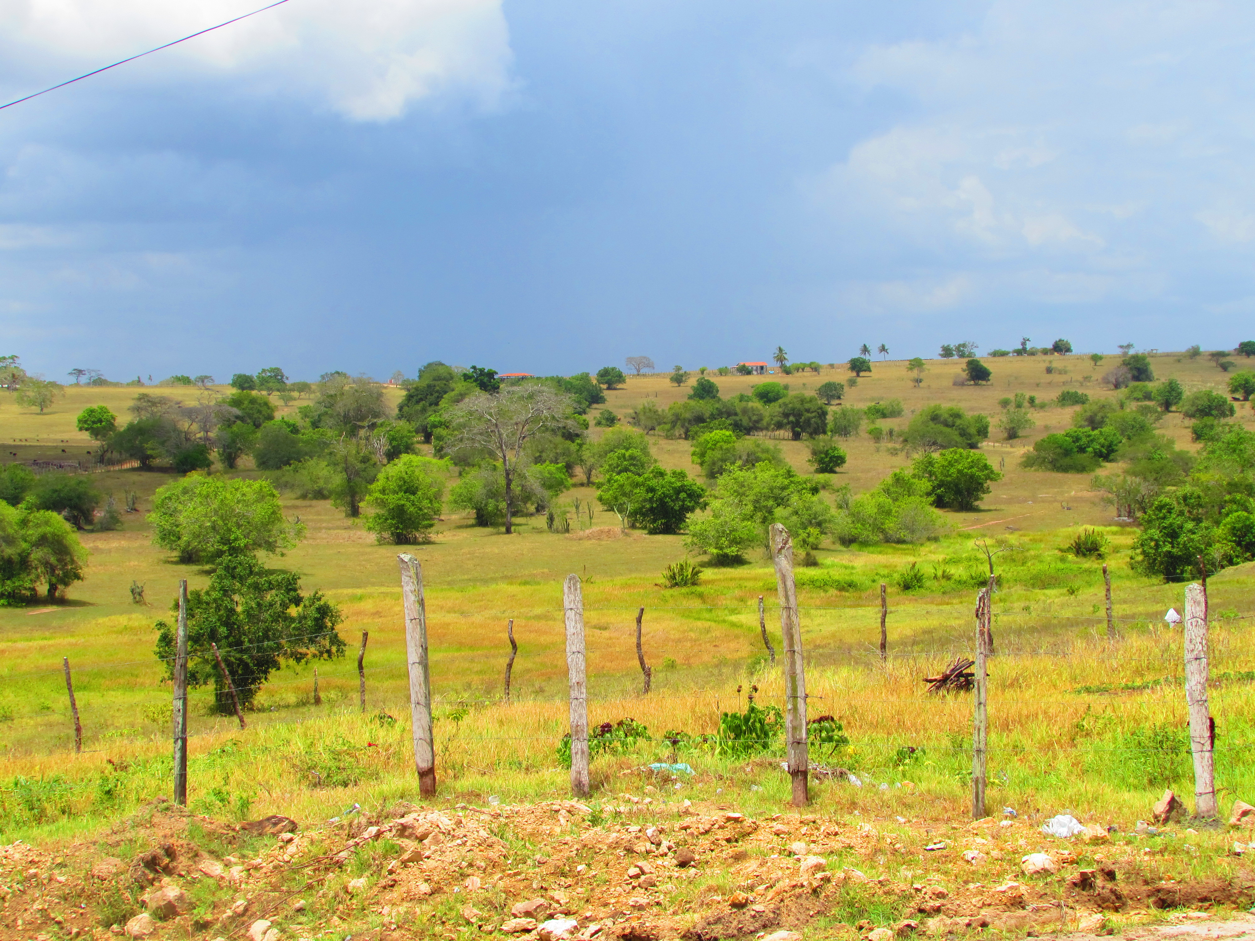 Sertão de antonio cardoso